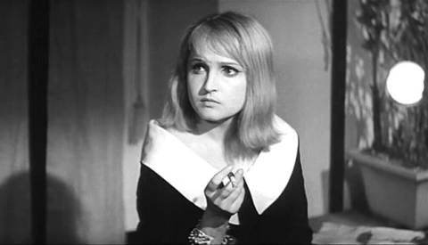 Képkocka „Az édes élet” című filmből, Laura Betti